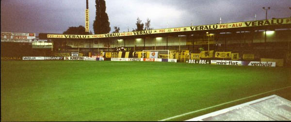 Lierse Lisp Tribune 2 1999